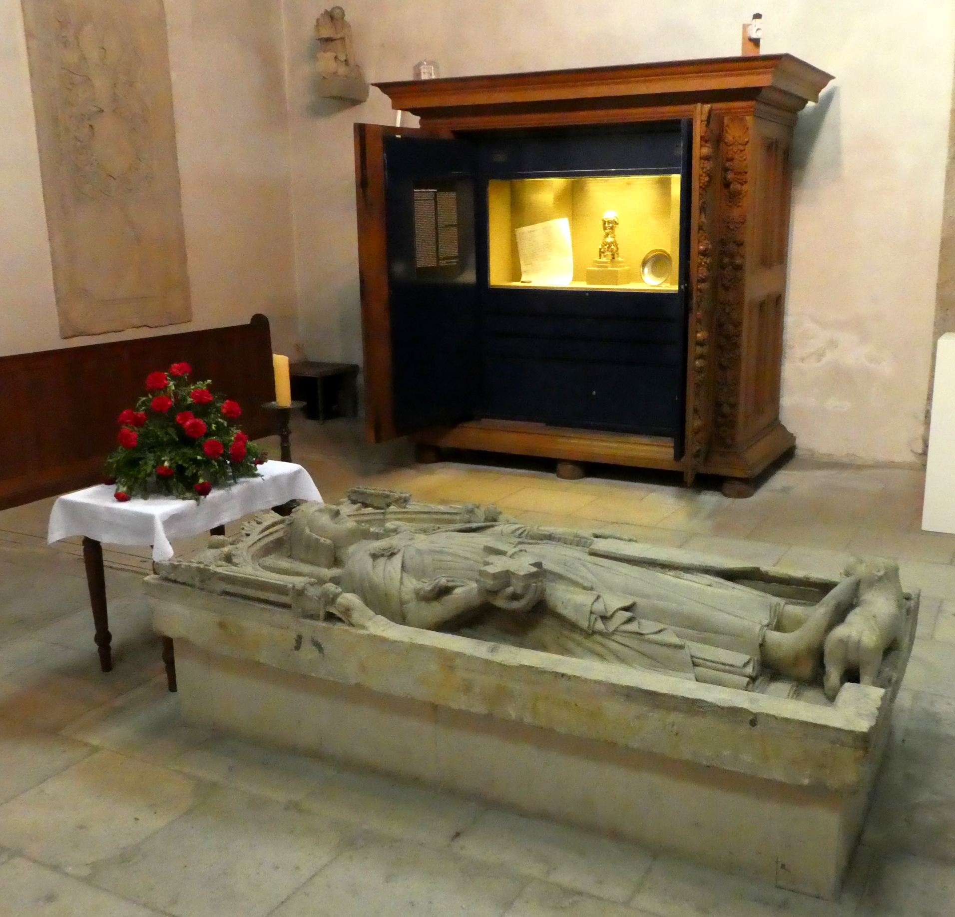 Südliches Querhaus der Stiftskirche Cappenberg mit dem Grab von Gottfried von Cappenberg und dem Schrank mit dem "Barbarossakopf"